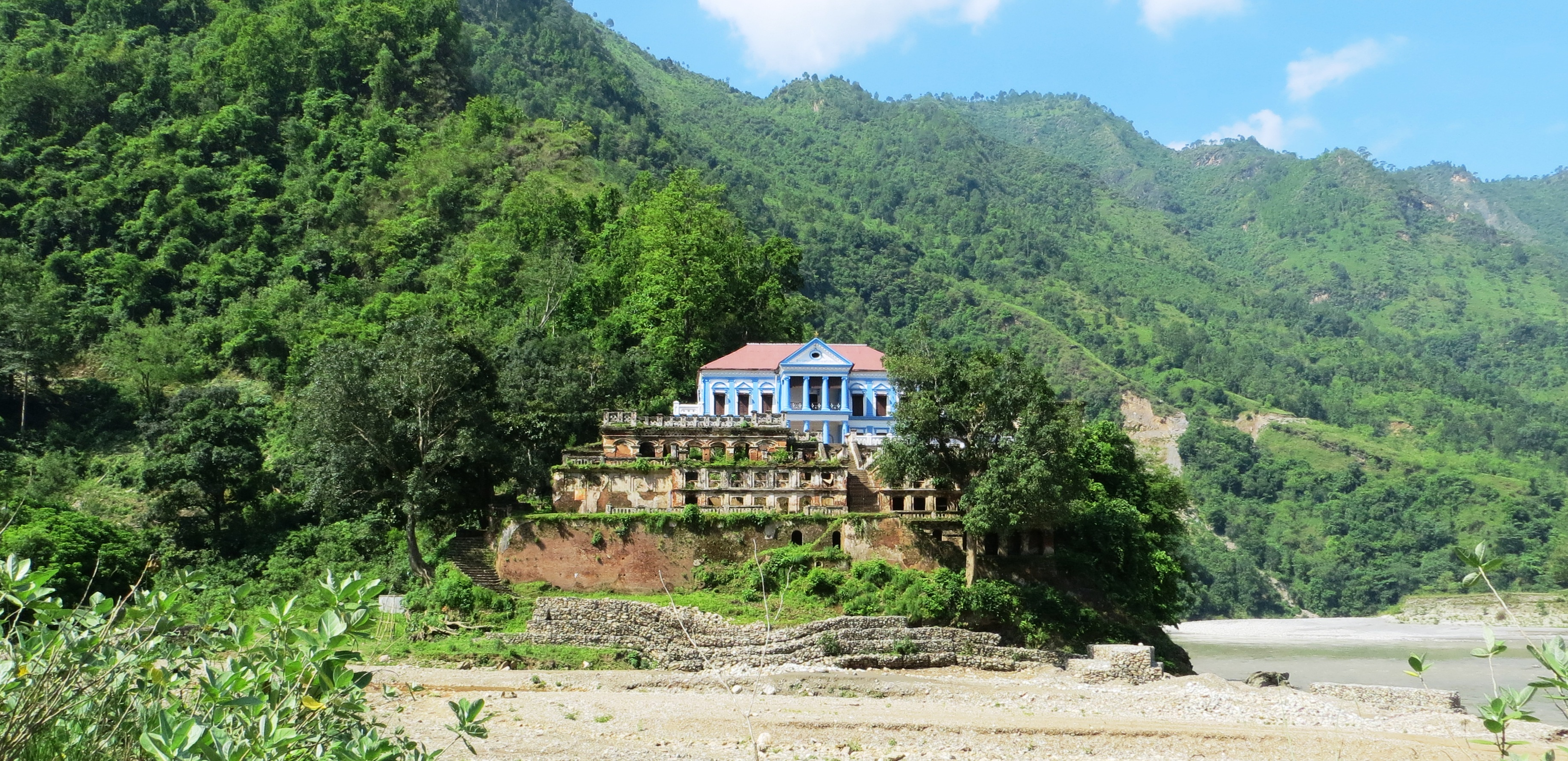 नेपाली: रानी महल, तानसेन, पाल्पा जिल्ला.